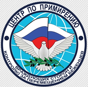 Эмблема российского Центра по примирению враждующих сторон и контролю за перемещением беженцев